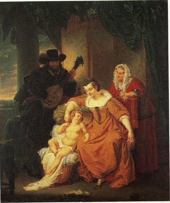 L'enfance de Montaigne-l'éveil en musique